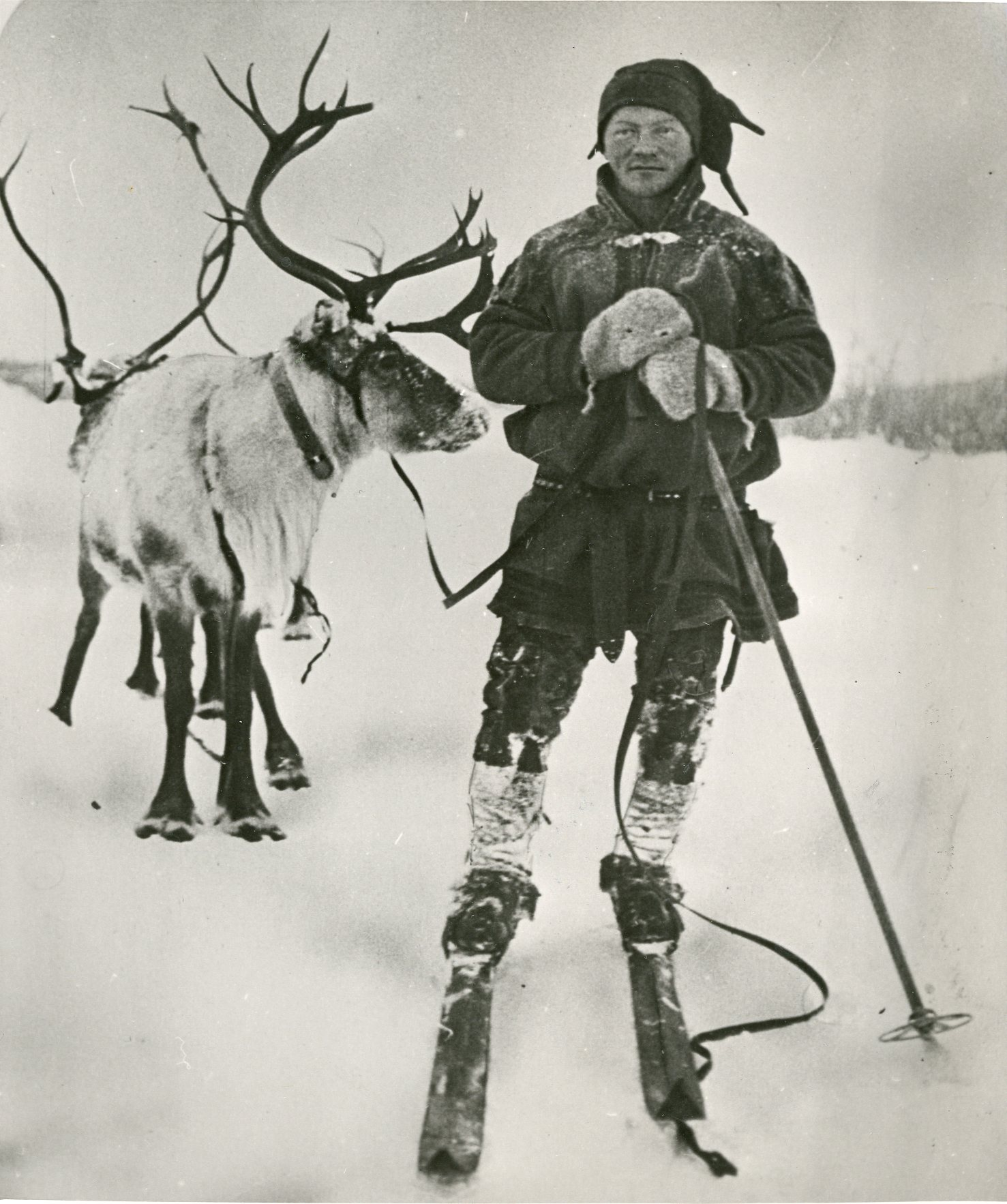 Under German forced evacuation of northern Norway in October 1944 succeeded part of the civilian population to take over to Sweden. Under great hardships and sufferings, under which also occurred deaths, struggles his way across the mountain plateaus until they finally were safe in Swedish area. Picture taken in Maunu in November, one of the Swedish border stations in the north, who have accepted a large share of refugees in those days. Norwegian Sami with his reindeer. Sth. 24.01.45. RA / Pa-1209 / Uc¬¬ / 68/1 / S5405